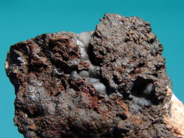 hollandyt, pochodzenie Polska; autor zdjęcia Piotr Gut